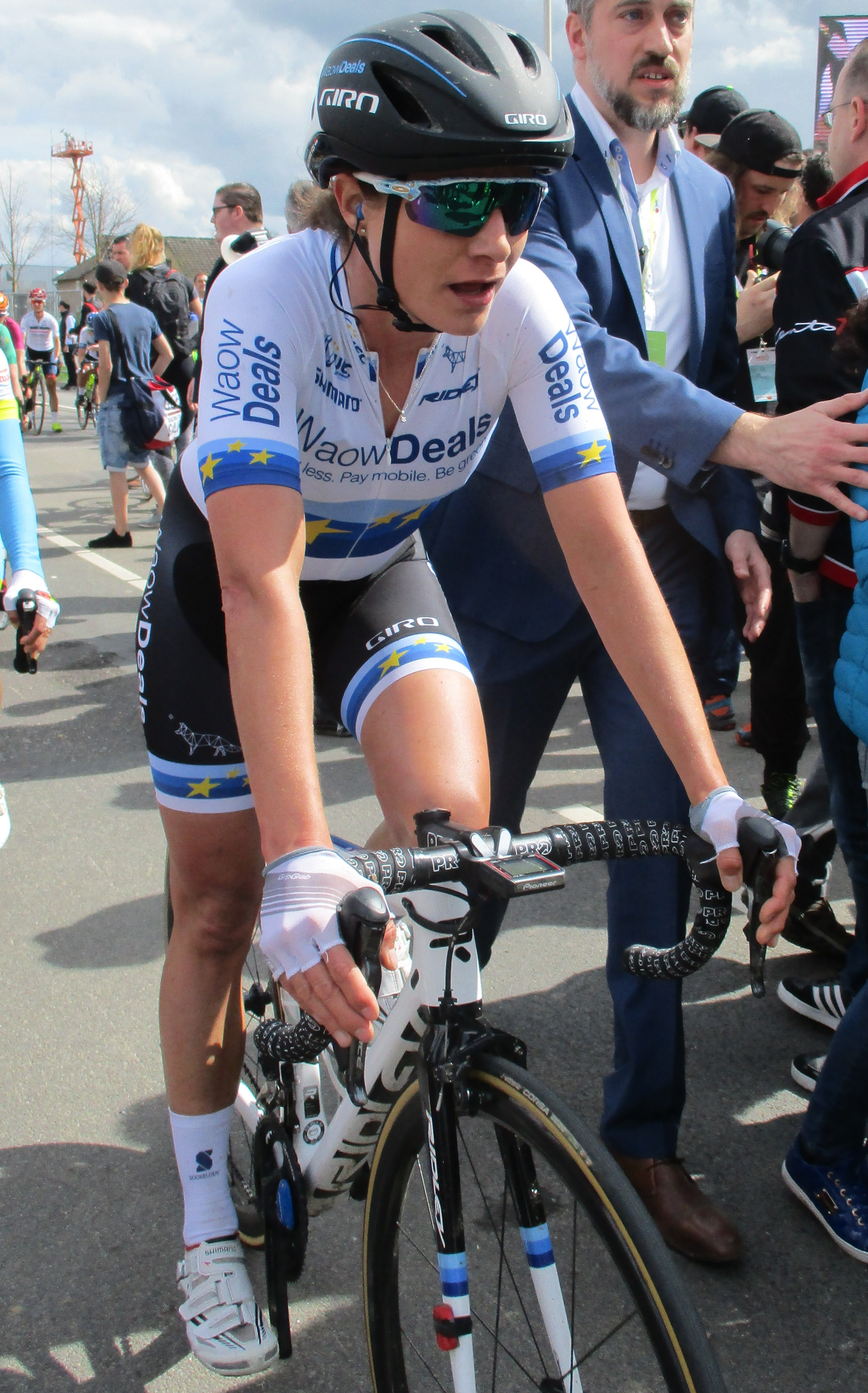 Finish van de Amstel Gold Race Ladies Edition 2018 in Berg, Valkenburg aan de Geul.